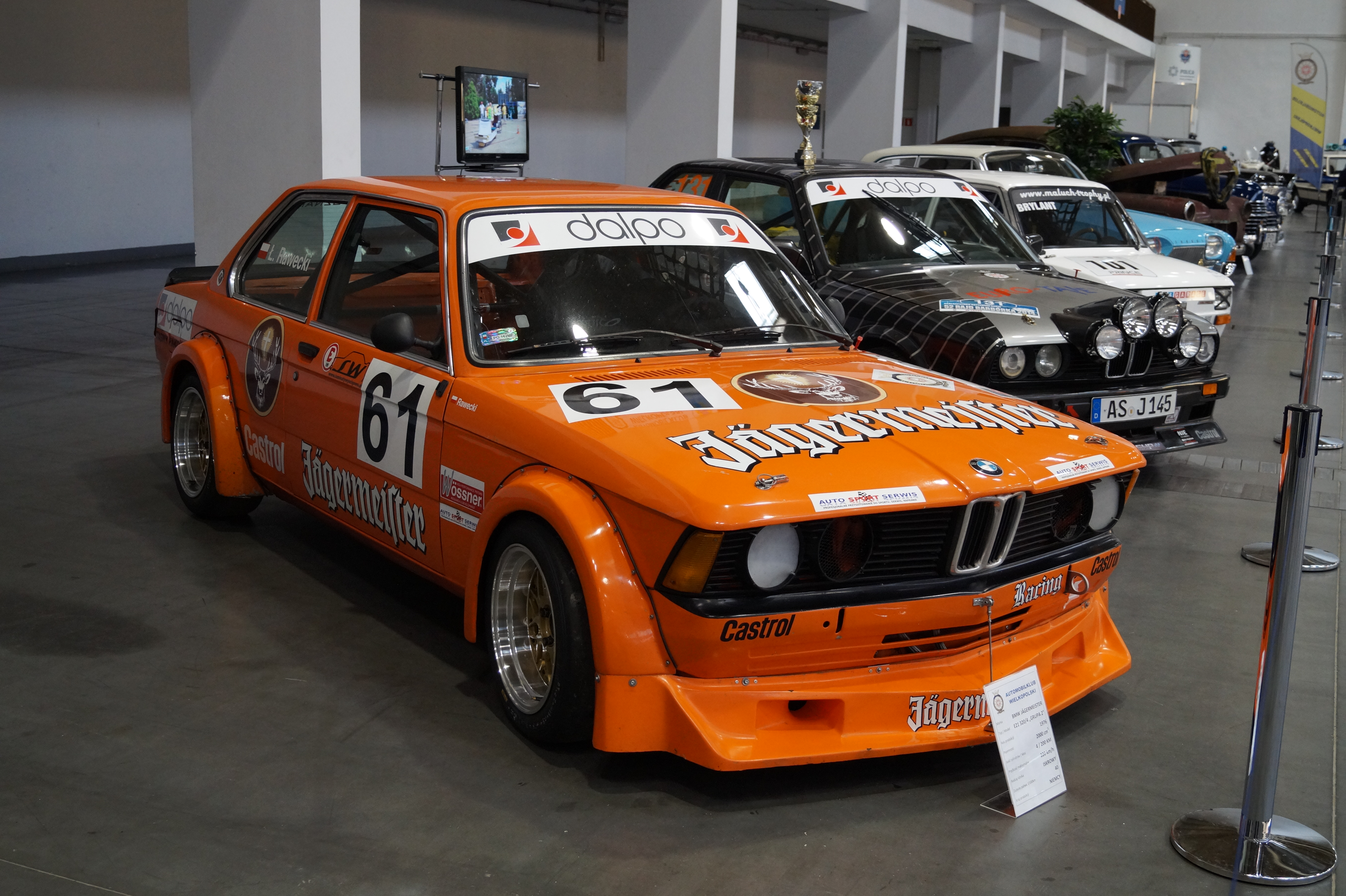 The making of this document was supported by Wikimedia Polska Association, within Wikigrant no. WG 2015-19. BMW E21 320 Łukasza Raweckiego na Motor Show Poznań 2015